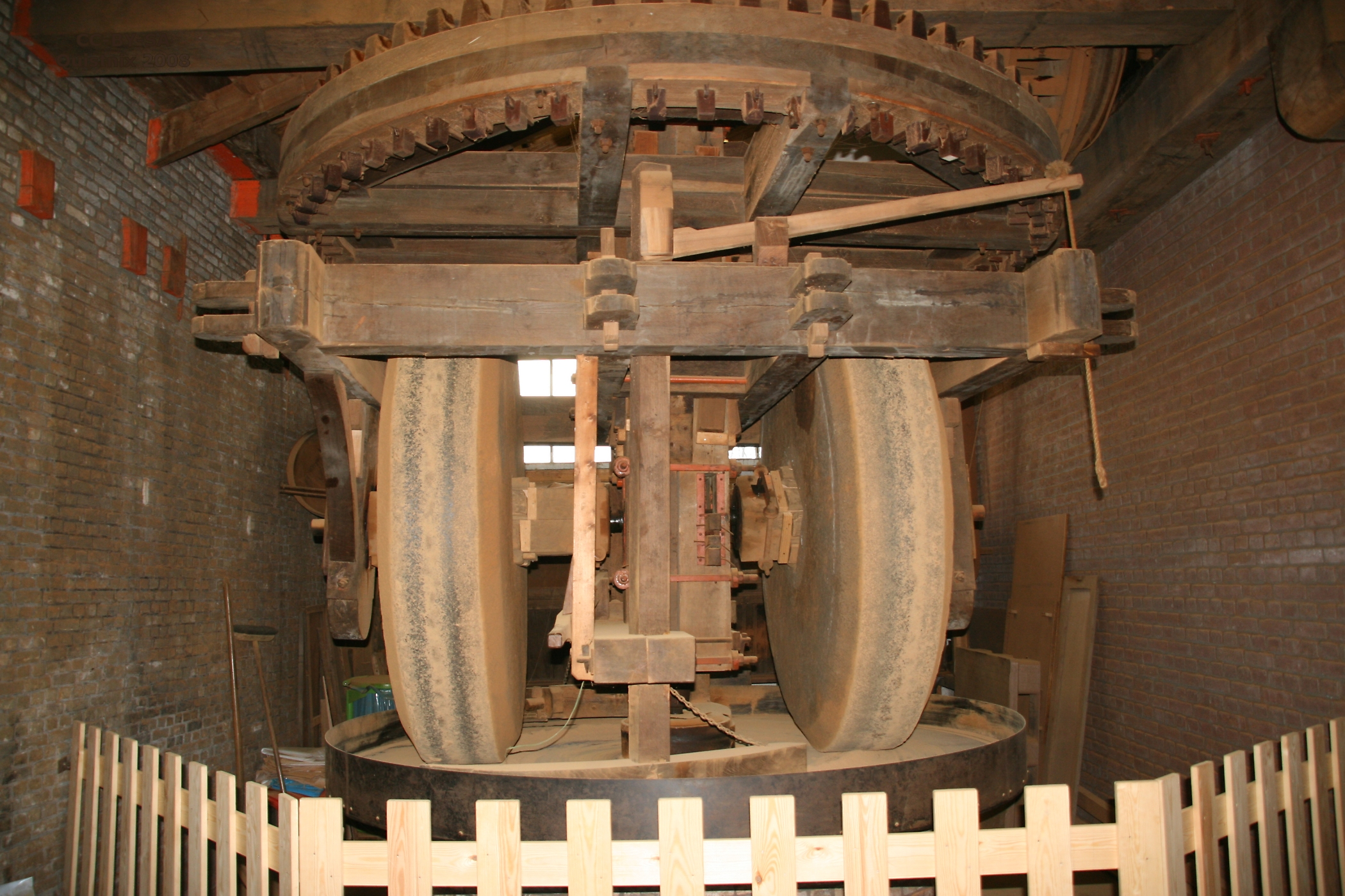 Rotterdam-Kralingen, windmolen De Ster: het malen van kaneel